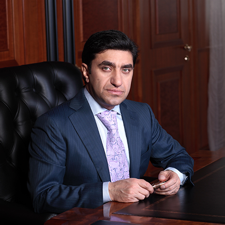 Год Нисанов